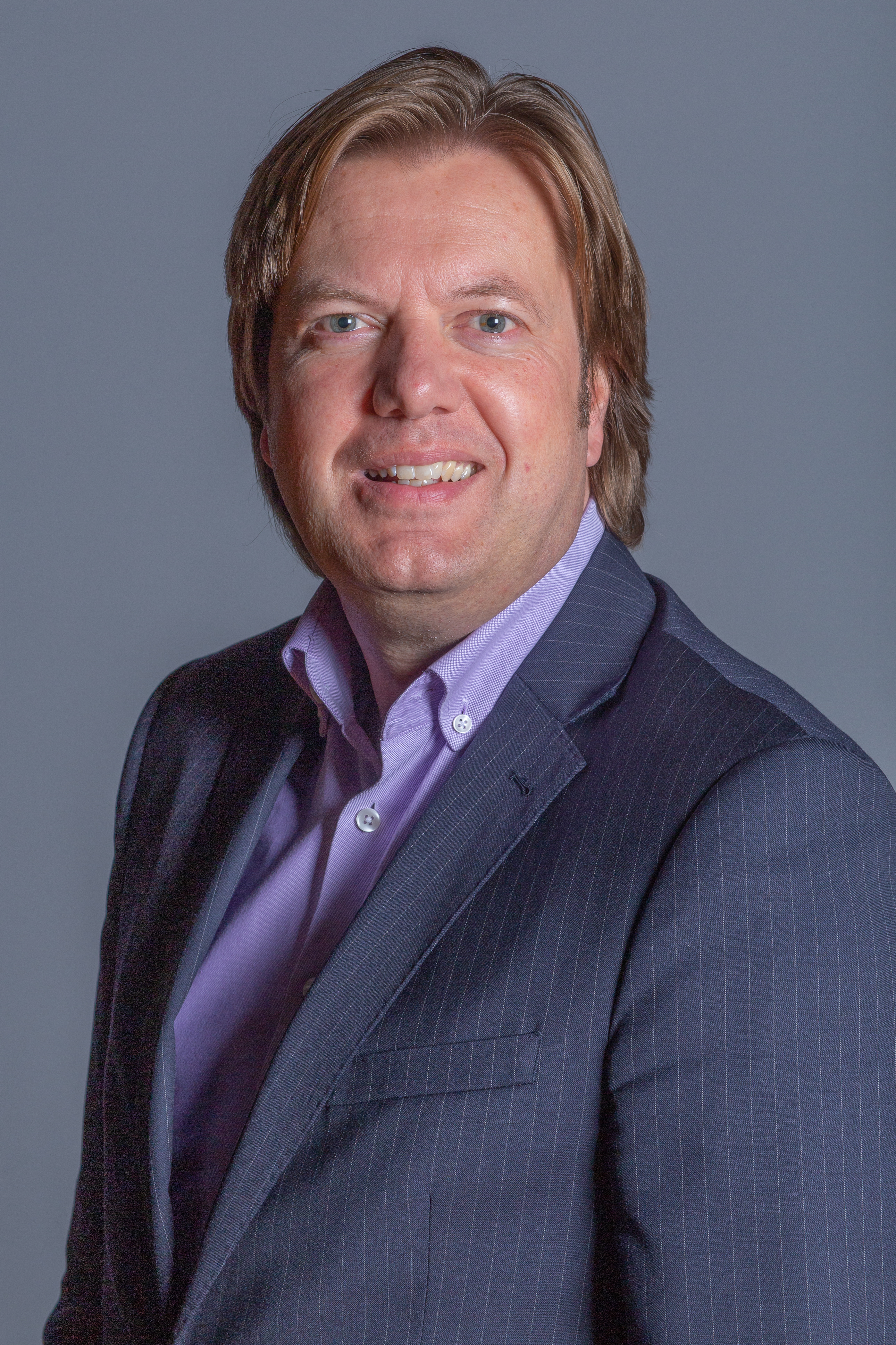 Abgeordnete(r) der Bürgerschaft der Freien und Hansestadt Hamburg Jens P. Meyer